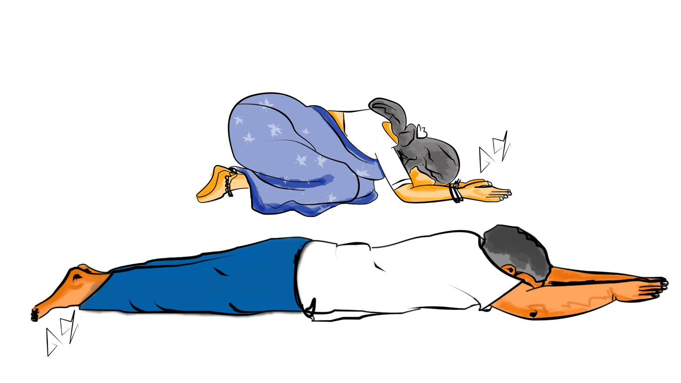 பஞ்சாங்க நமஸ்காரம், அட்டாங்க நமஸ்காரம்